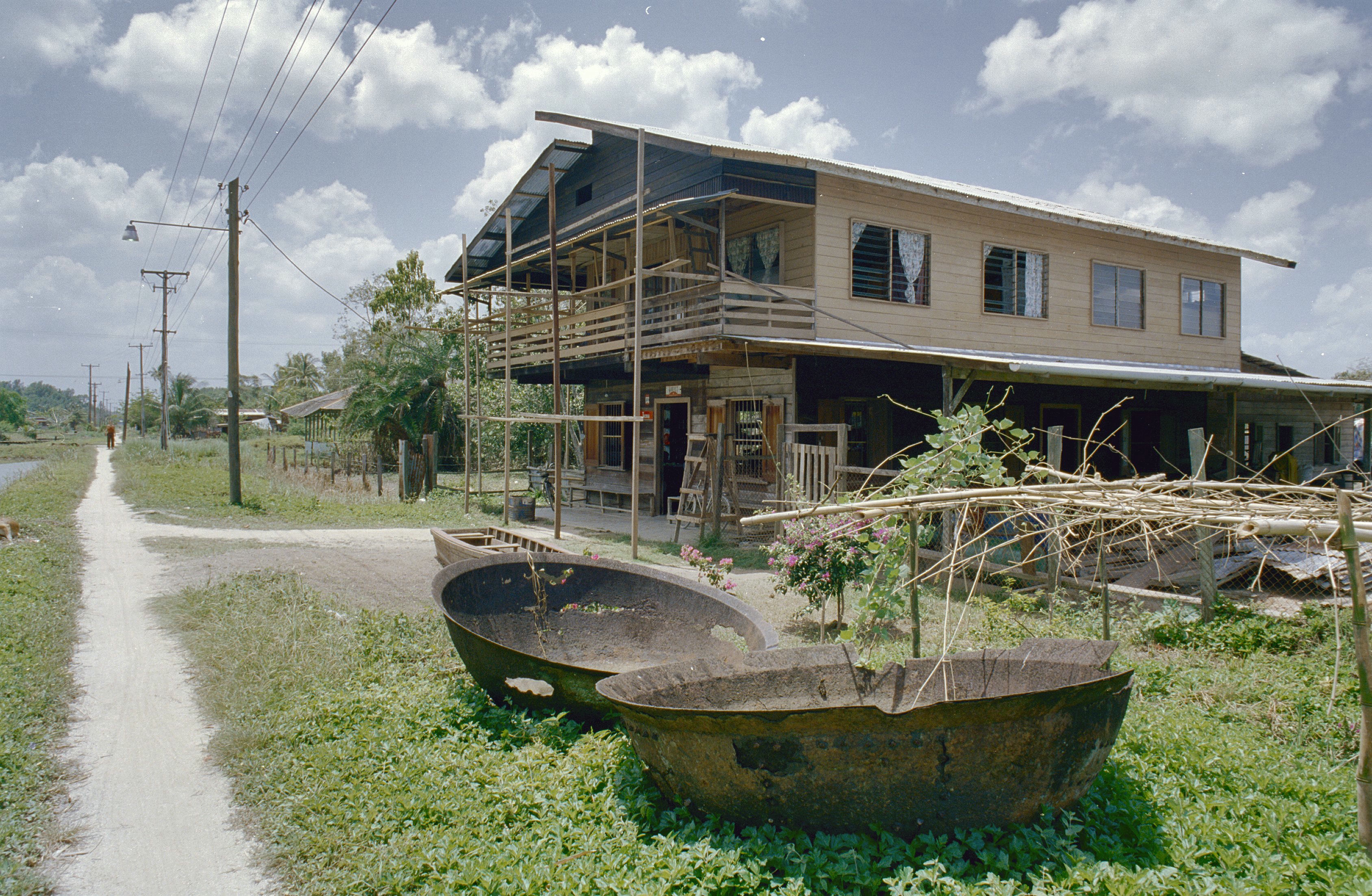 Koloniale geschiedenis: Overzicht huis met omgeving (opmerking: Suriname Reis Loek Tangel)